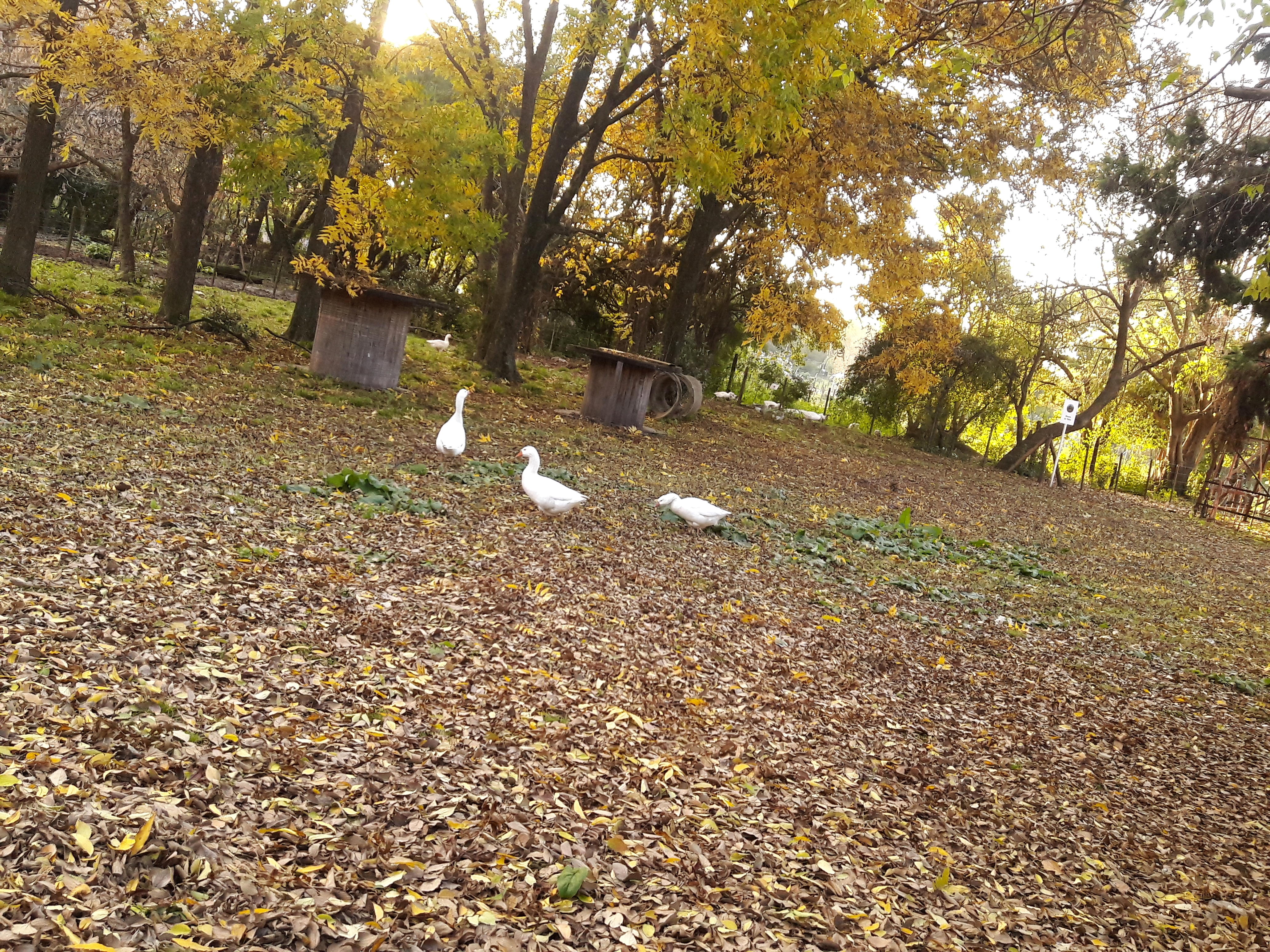 En una tarde otoñal